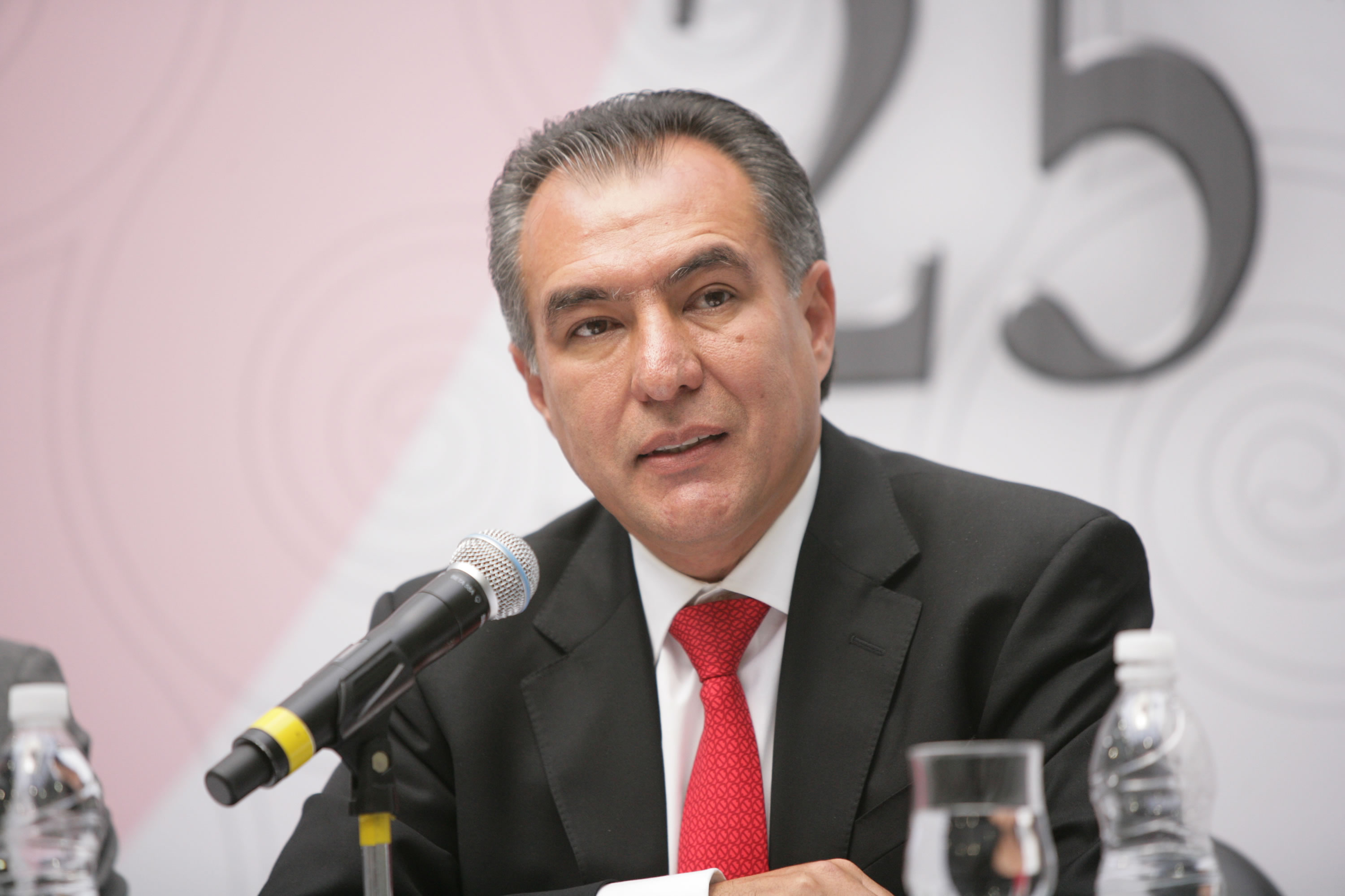 Marco Antonio Adame Castillo en Conferencia de Prensa